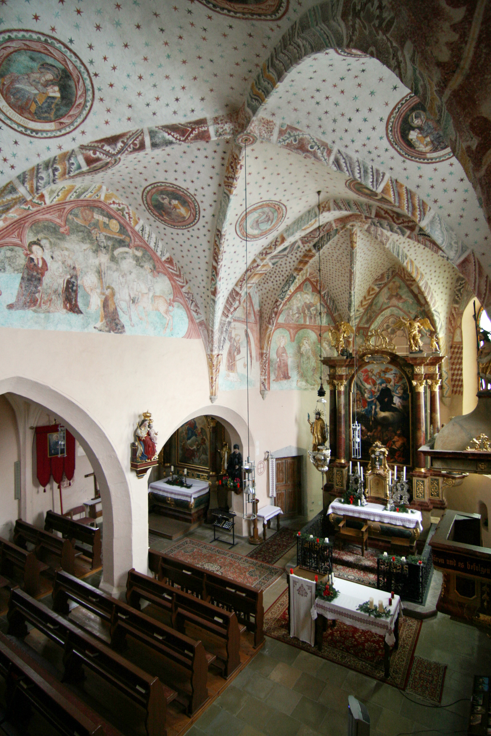 Kath. Filialkirche hl. Leonhard